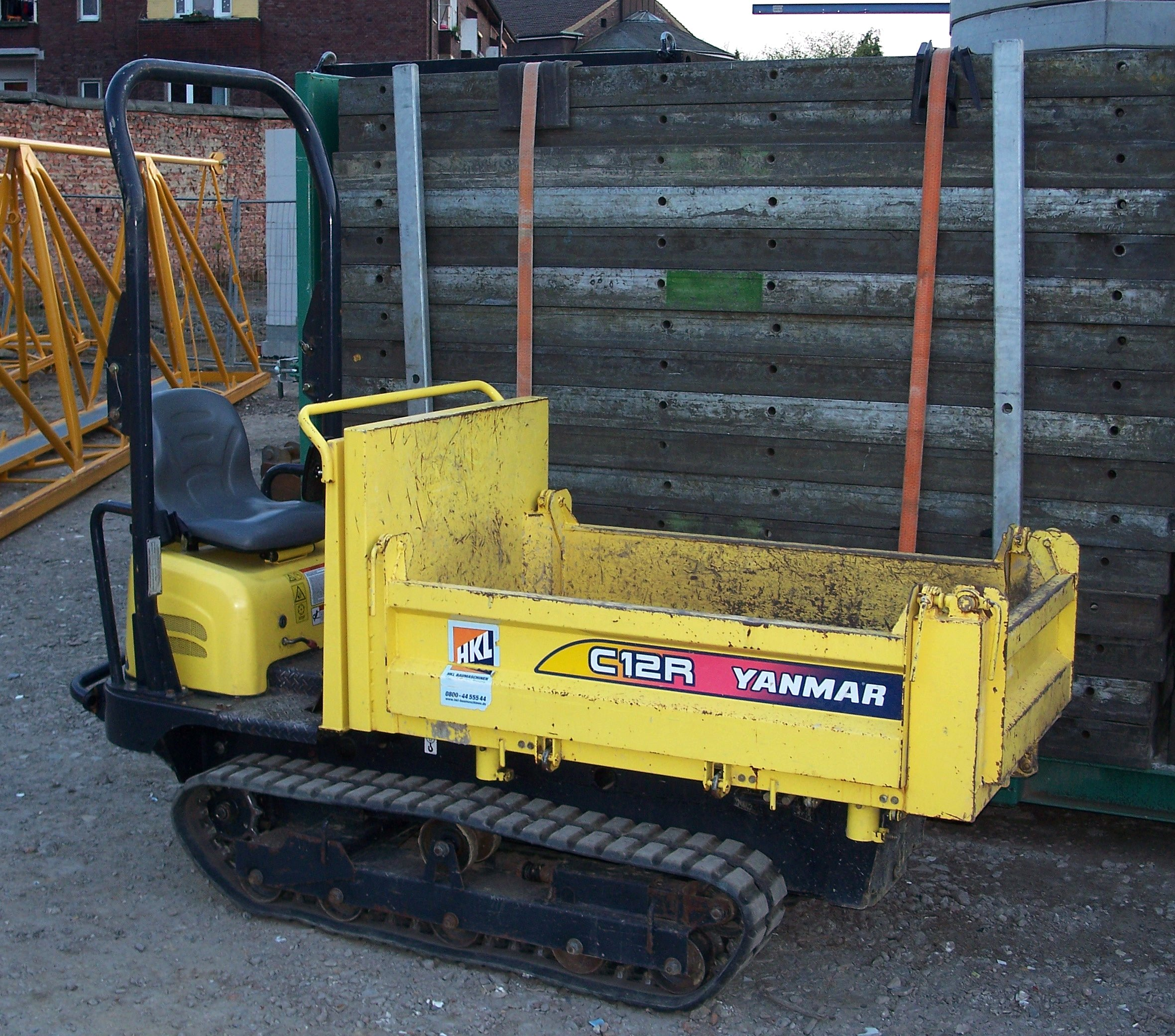 Raupentransporter der Firma Yanmar